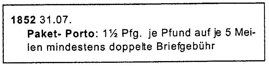 1852 verbilligtes Paketporto in Preußen